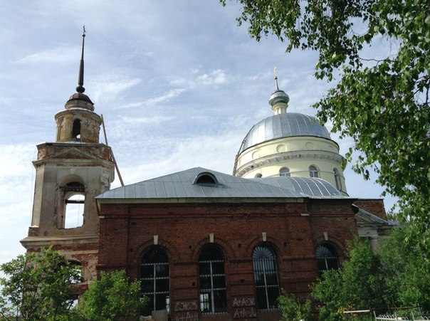 Церковь Троицкая: Бакунино (Троицкое), Калининский район, Тверская область